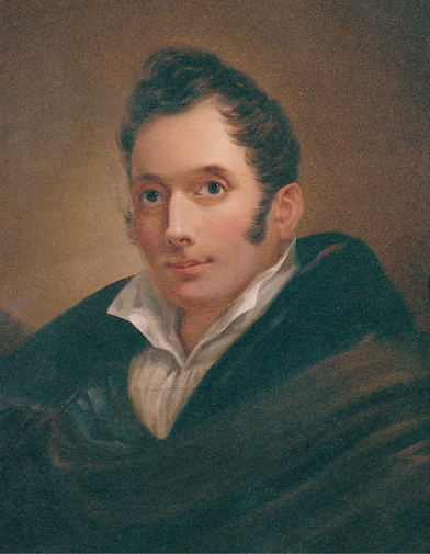 Porträt des Lüneburger Juristen, Politikers und Revolutionärs Dr. Carl Rudolph Ferdinand Christiani (1797-1858), gemalt von Nikolaus Peters (1795-1875), ca. 1830. Besitz des Museums für das Fürstentum Lüneburg.